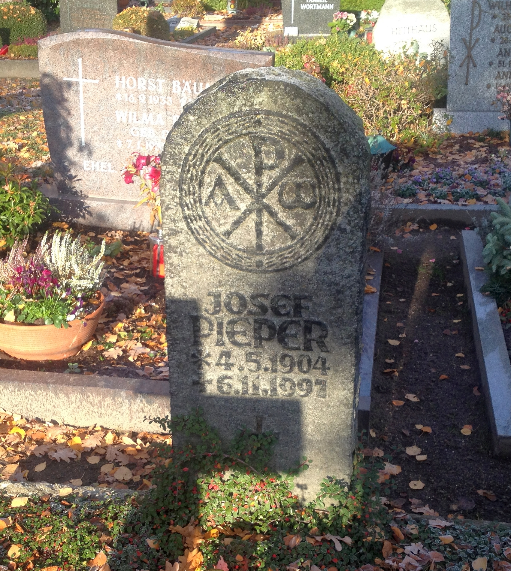 Joseph Pieper Grab